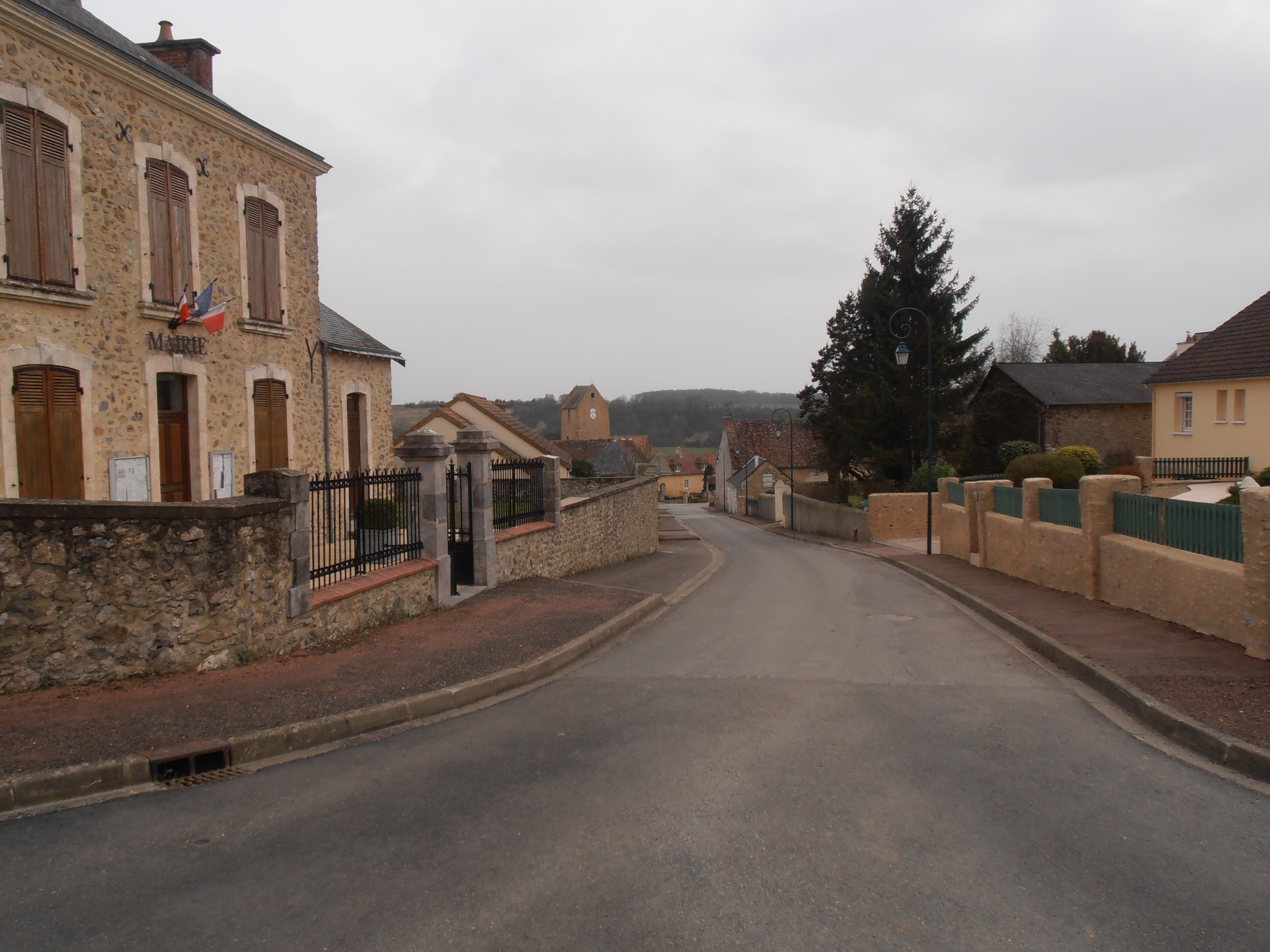 Vue de Mareil-en-Champagne depuis la mairie